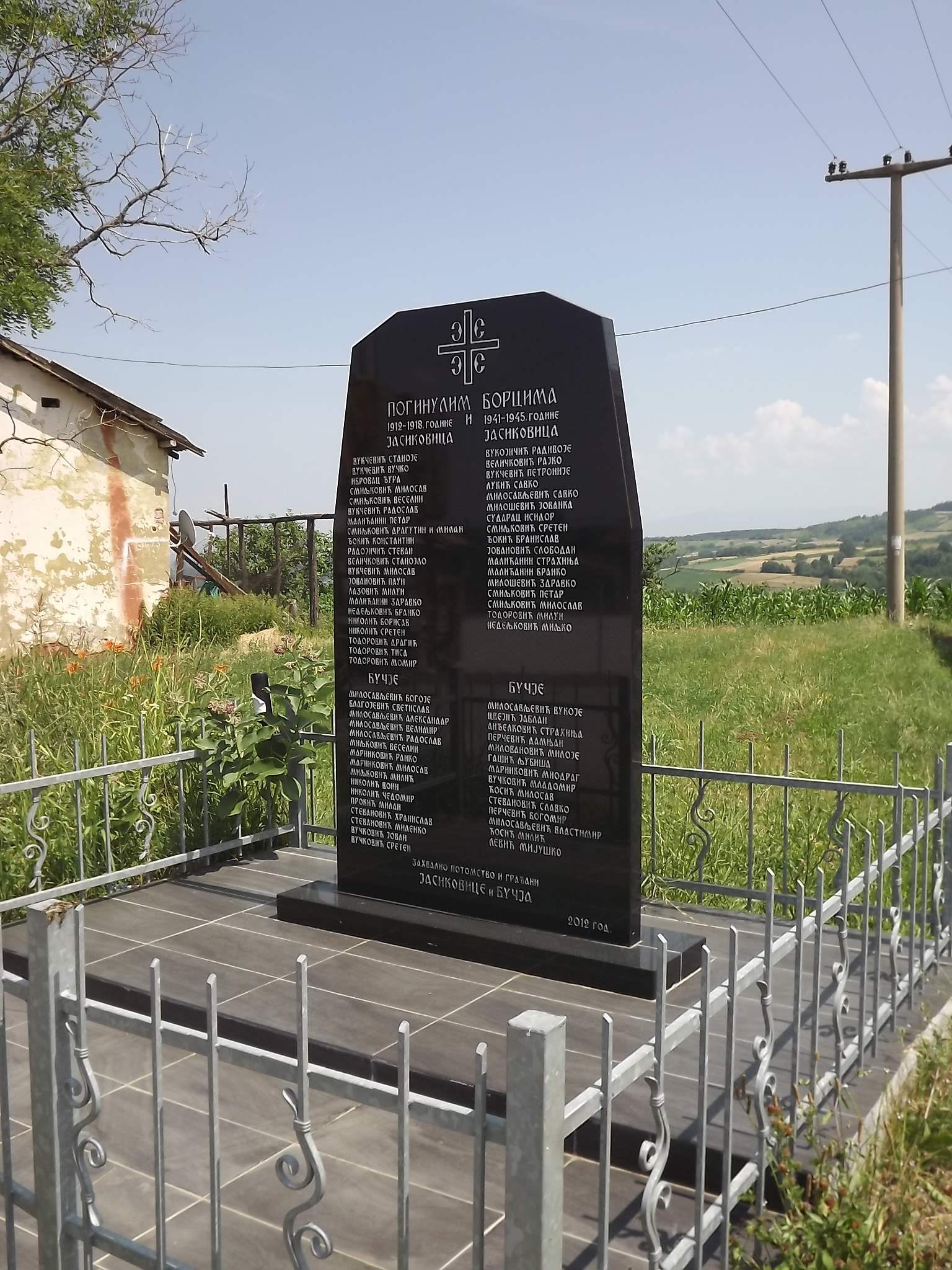 Spomenik borcima u oslobodilackim ratovima selo Jasikovica - Fotografija nastala u okviru saradnje Narodnog univerziteta Trstenik Narodne biblioteke Jefimija i saveza boraca Trstenik.